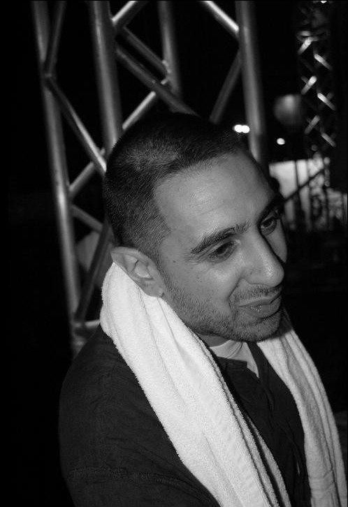 Houman Sebghati